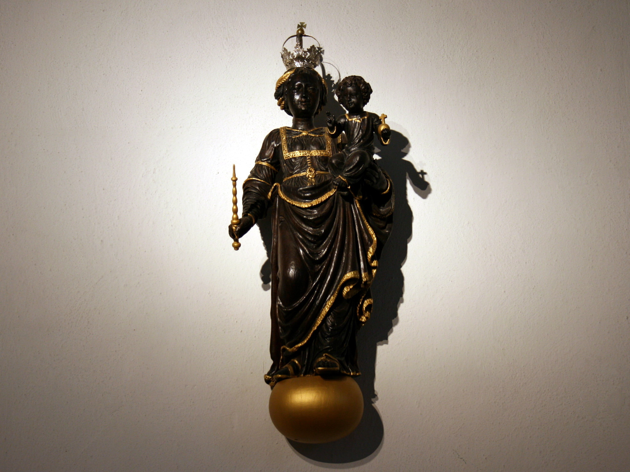 Kirche Sankt Johannes in Wipperfürth-Kreuzberg